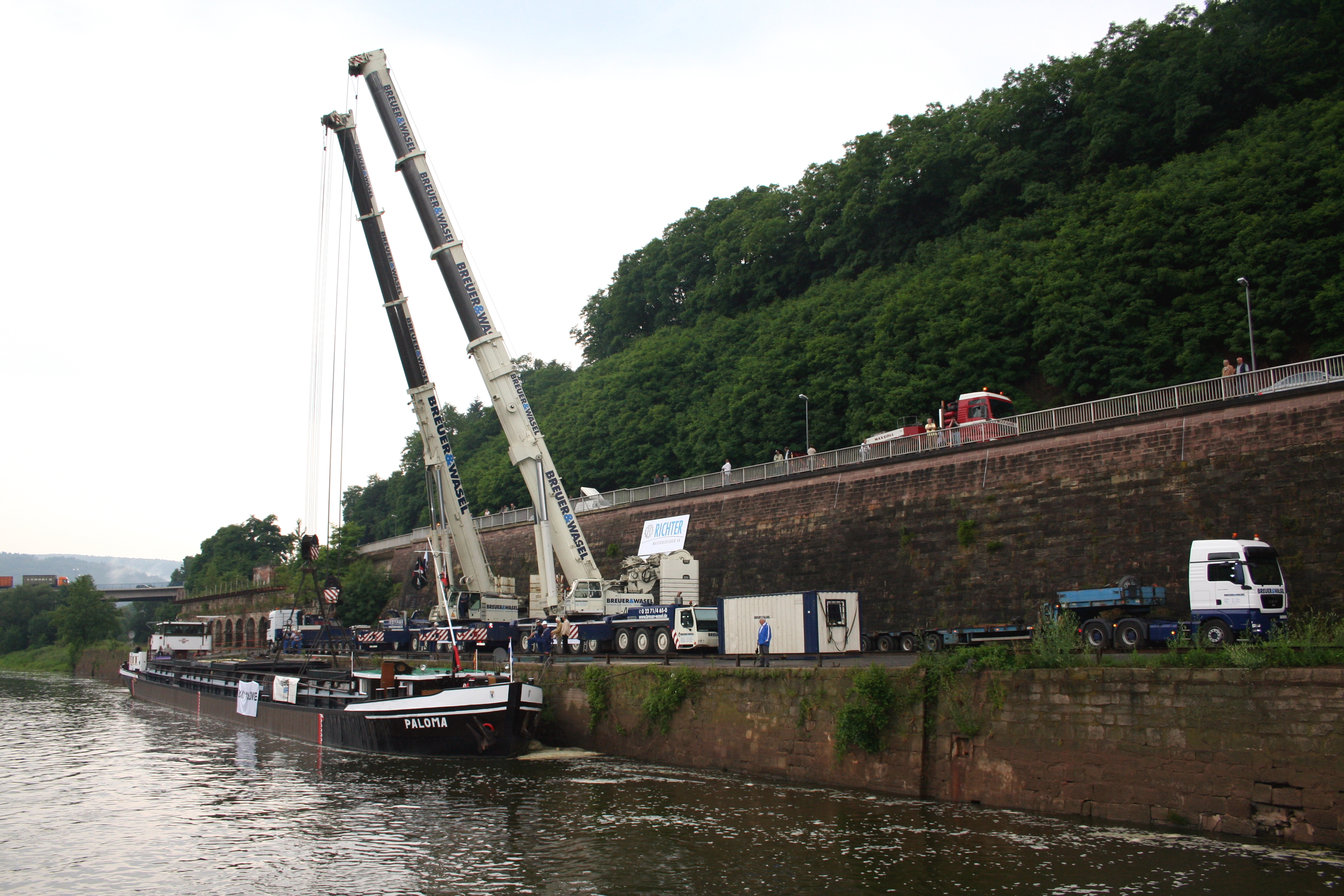 Weserumschlagstelle, Verladung